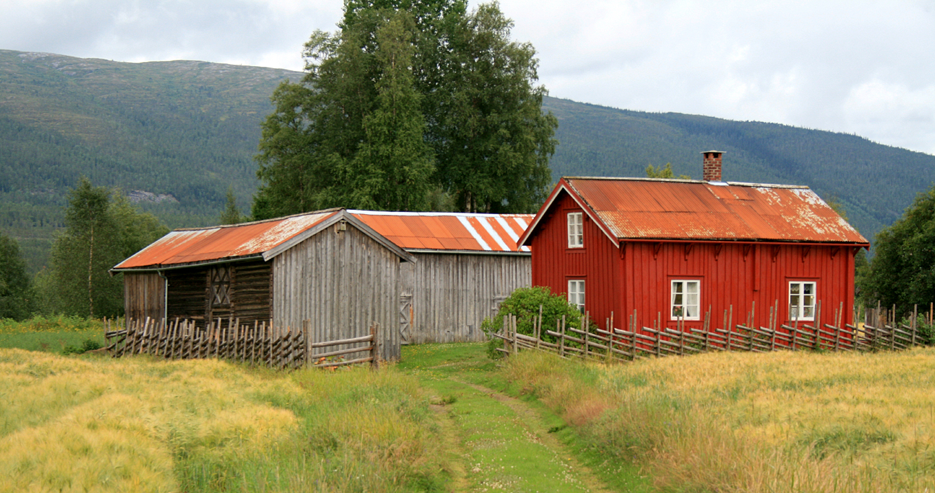 Sandmo, Snåsa. Freda husmannsplass.